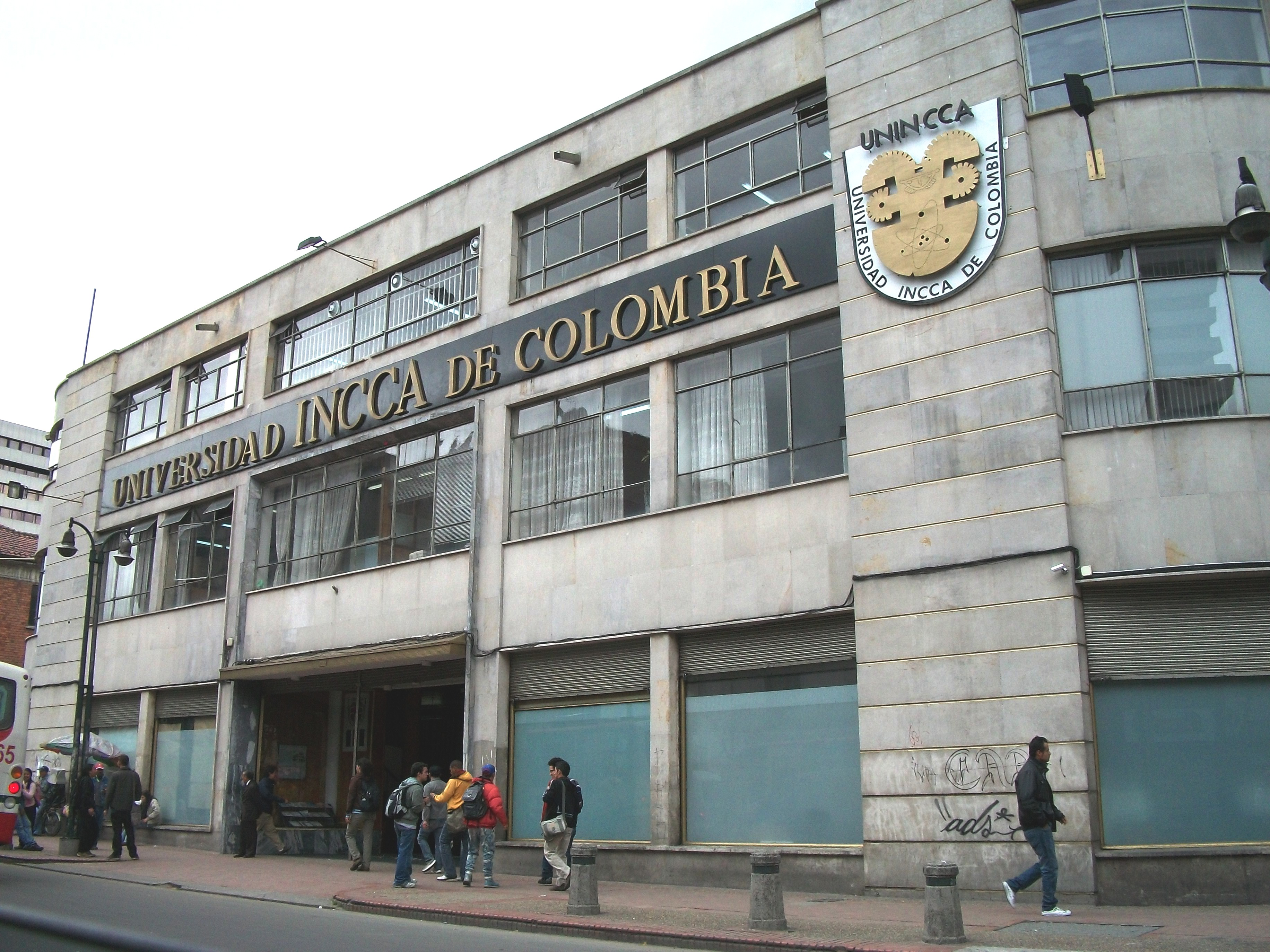 Universidad INCCA de Colombia, cra 13 con clle 24. Bogotá.